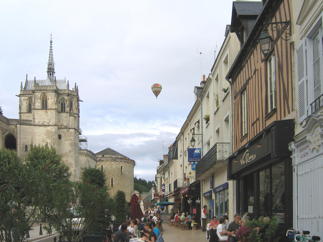 Amboise, rue près du château, Indre-et-Loire, France